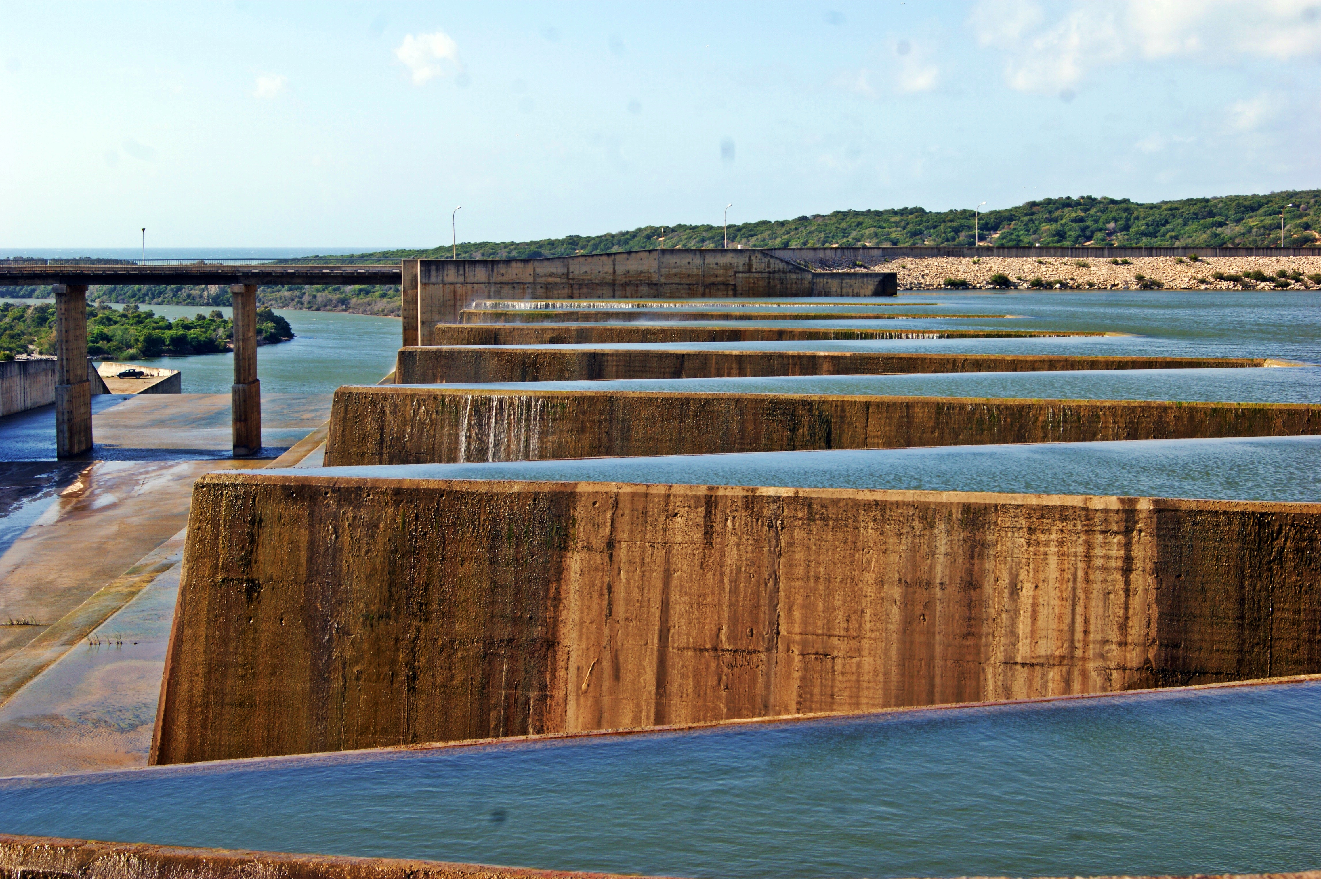 Barrage Sidi el Barrak, Gouvernorat de Béja, Tunisie